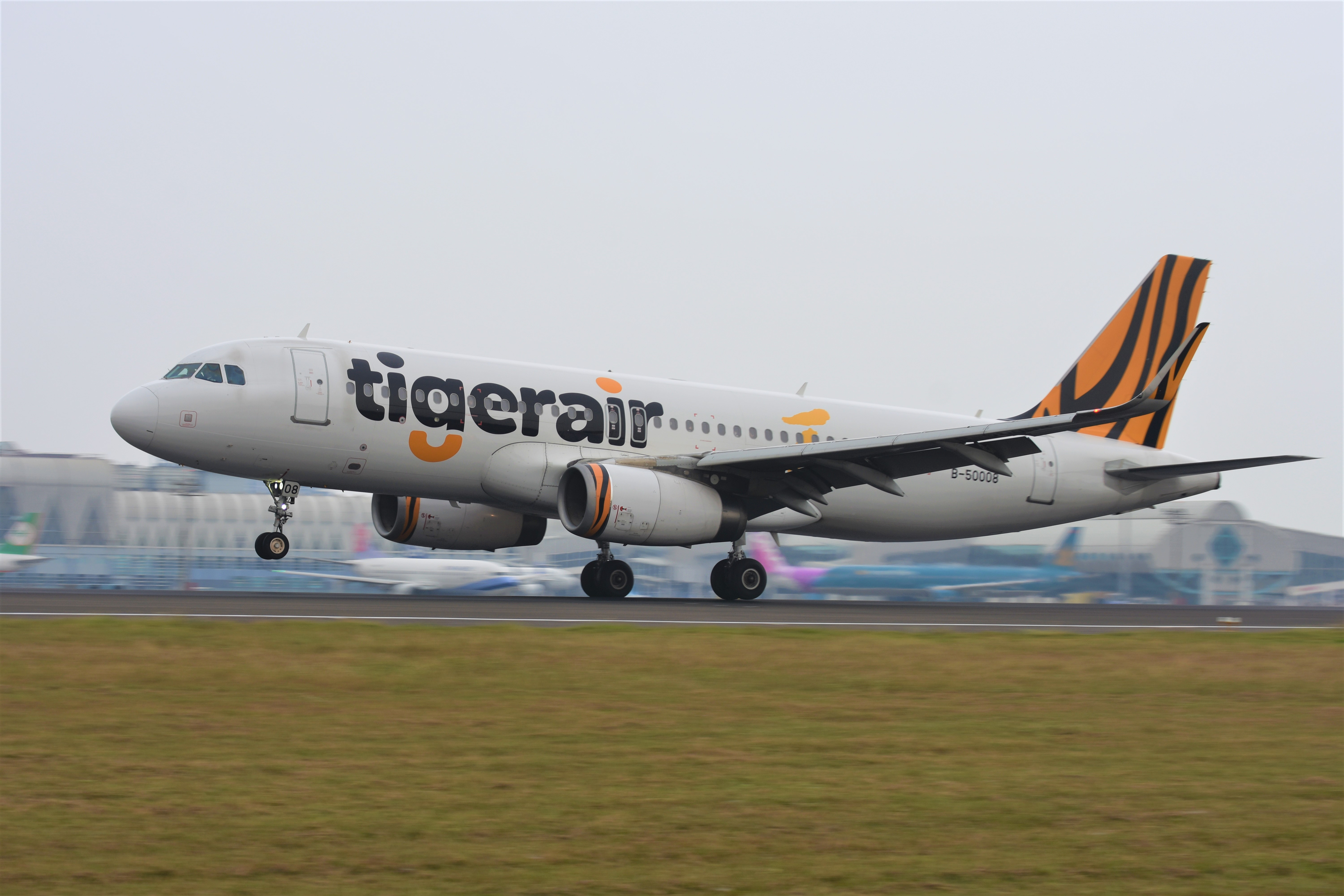 中文（台灣）: 台灣虎航空中巴士A320客機B-50008，在高雄國際機場起飛。